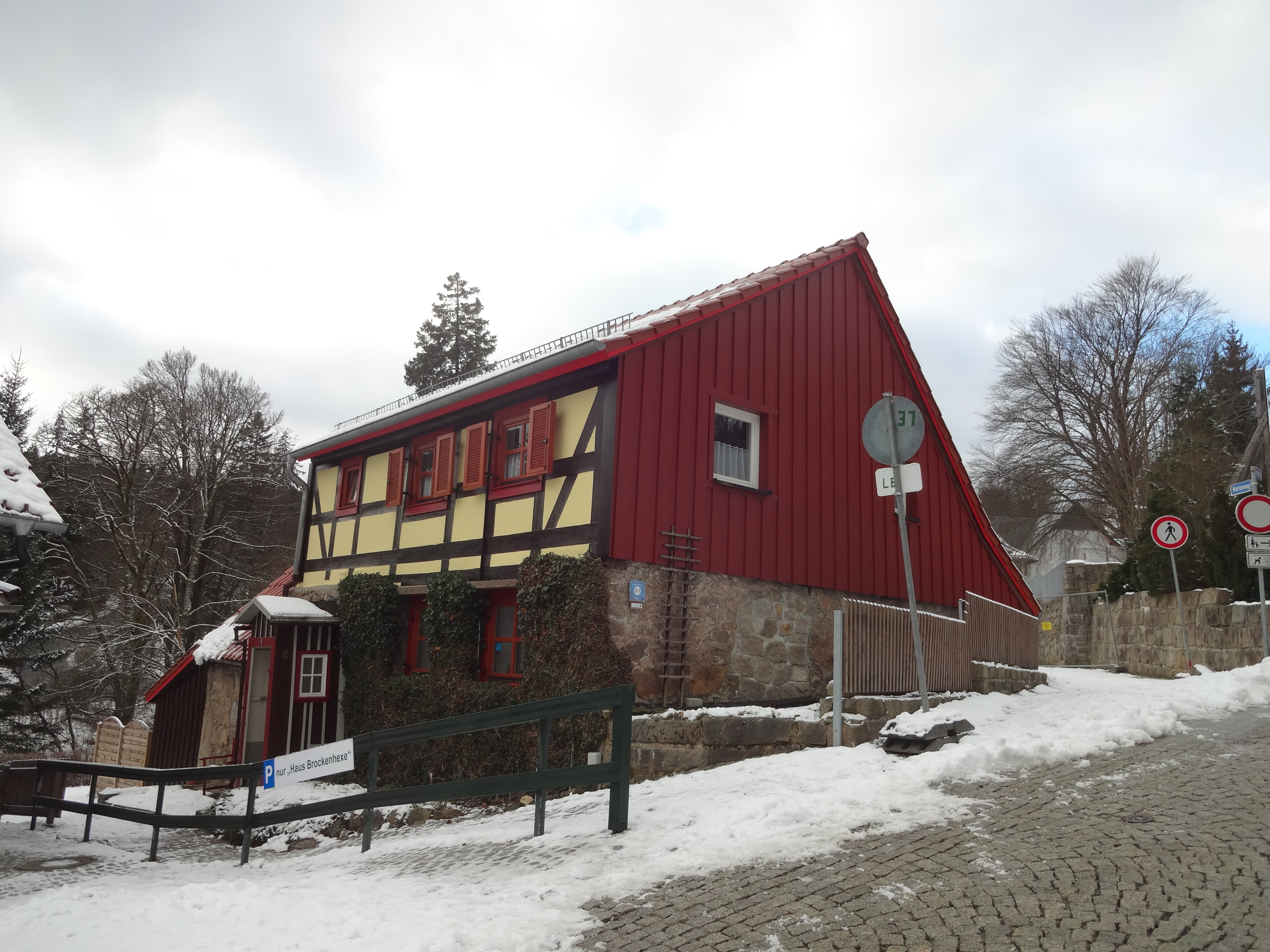 ehemals als Kulturdenkmal geschütztes Wohnhaus in der Straße Kirchberg 6 in Schierke im Harz